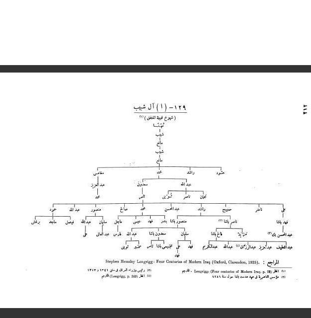 شجرة لأسرة السعدون (آل شبيب سابقا) من كتاب معجم الأنساب والأسرات الحاكمة في التاريخ الأسلامي للمستشرق زامباور ، صفحة 212 - زامباور كان وزيرا للنمسا في البلاط العثماني مابين 1913م - 1918م.